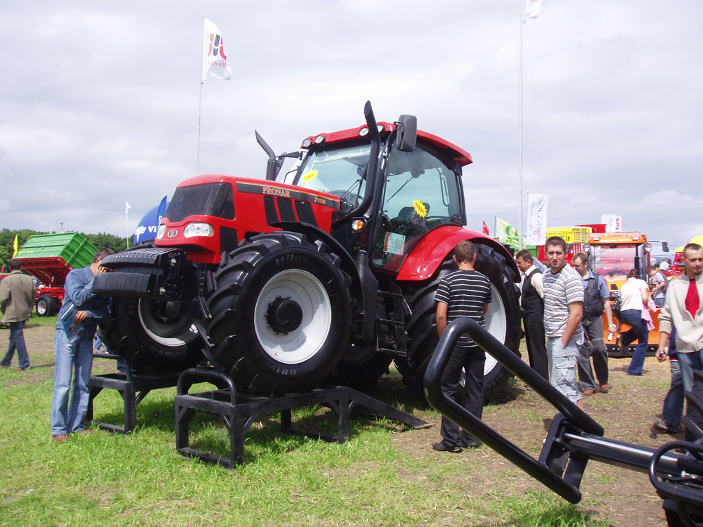 Ciągnik rolniczy Pronar 7150.